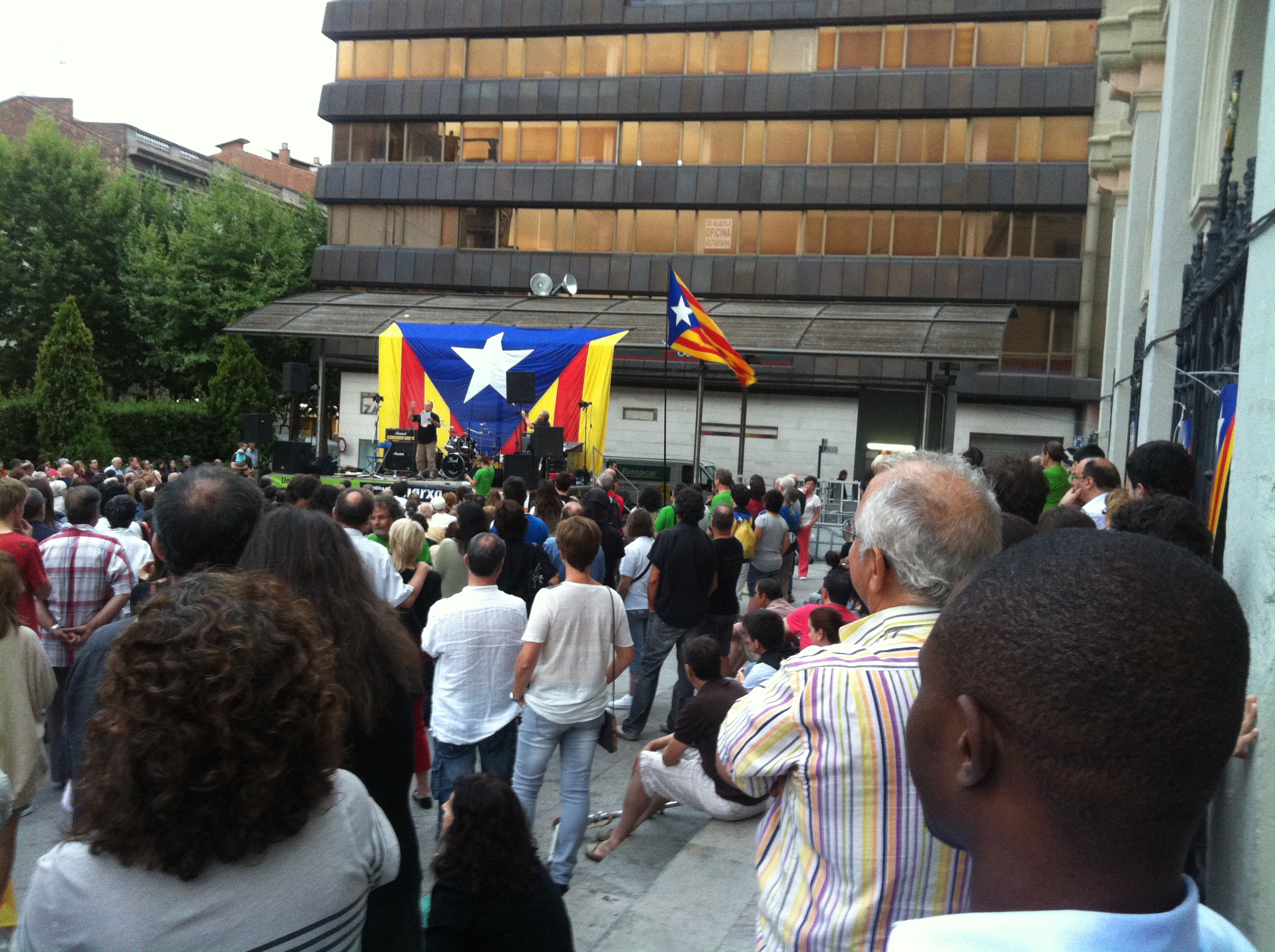 Acte de l'Assamblea Nacional Catalana a Sabadell, amb Toni Albà fent una intervenció